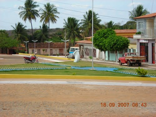 Vista da praça Daniel Teixeira